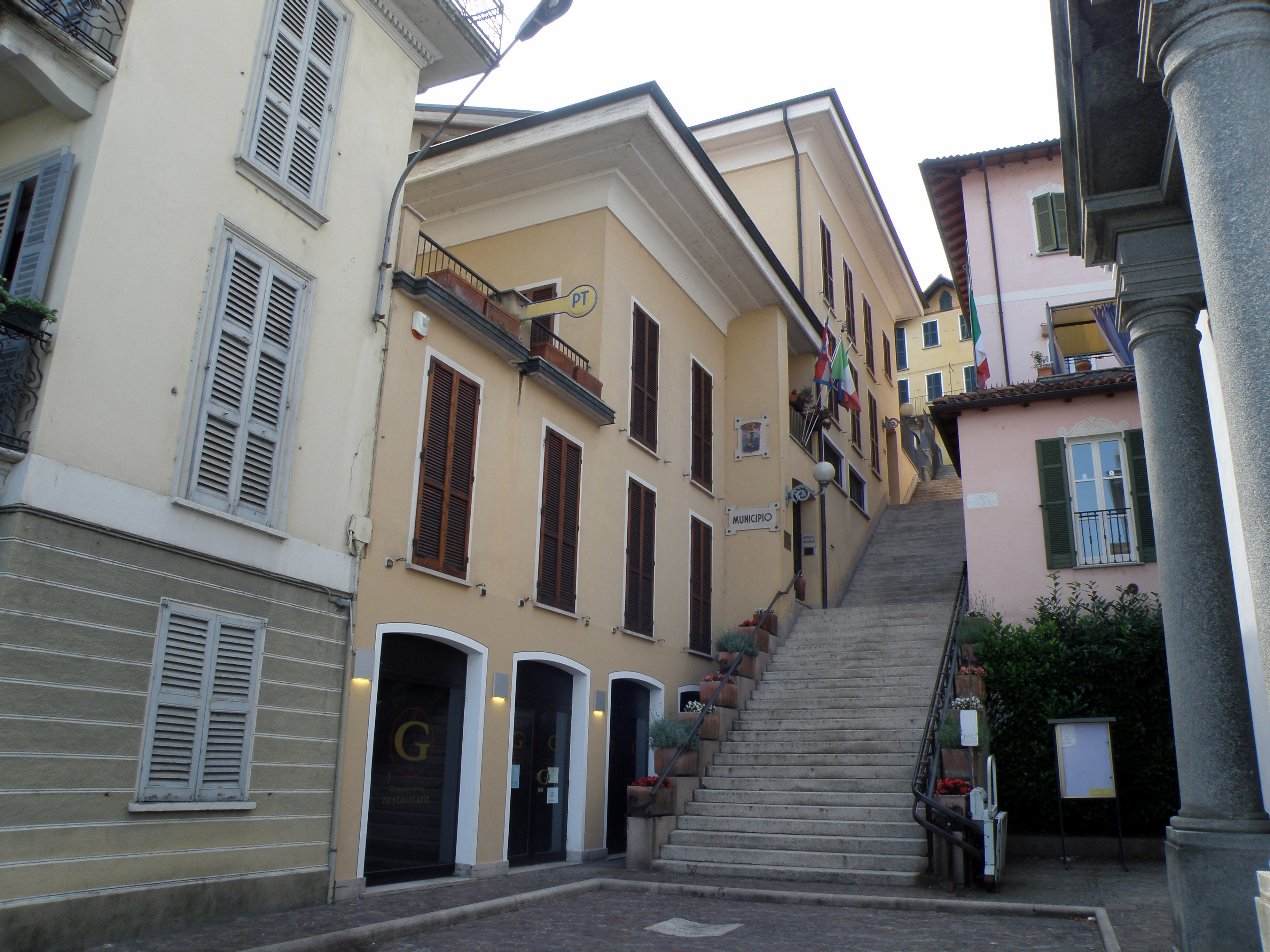 Belgirate (VB). Il municipio (a sinistra). A destra, colonne della chiesa parrochiale.